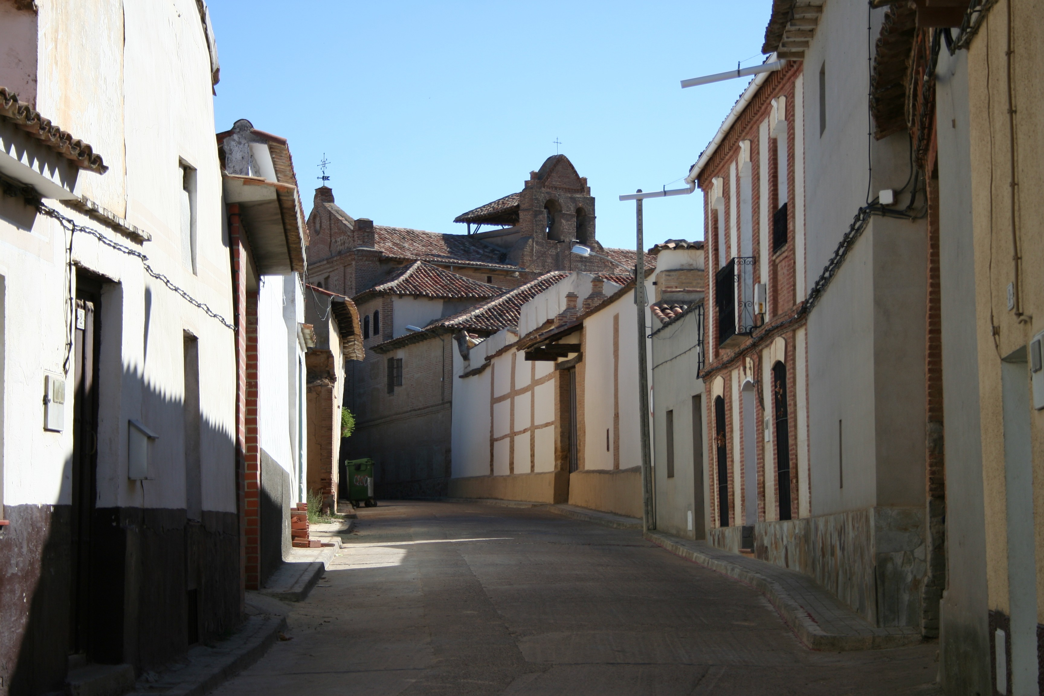 Calle de las monjas